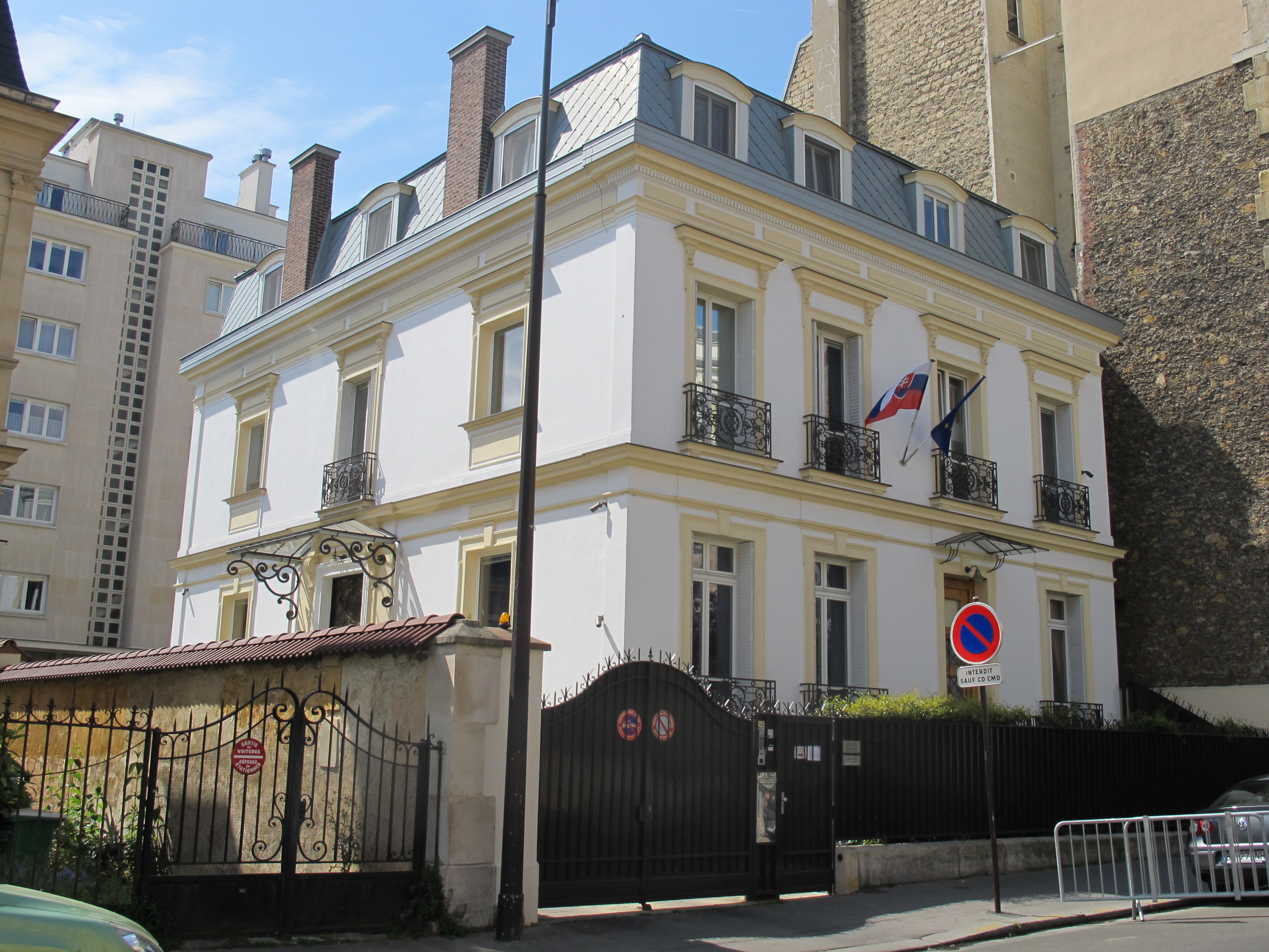 Ambassade de Slovaquie en France, Rue du Ranelagh, Paris